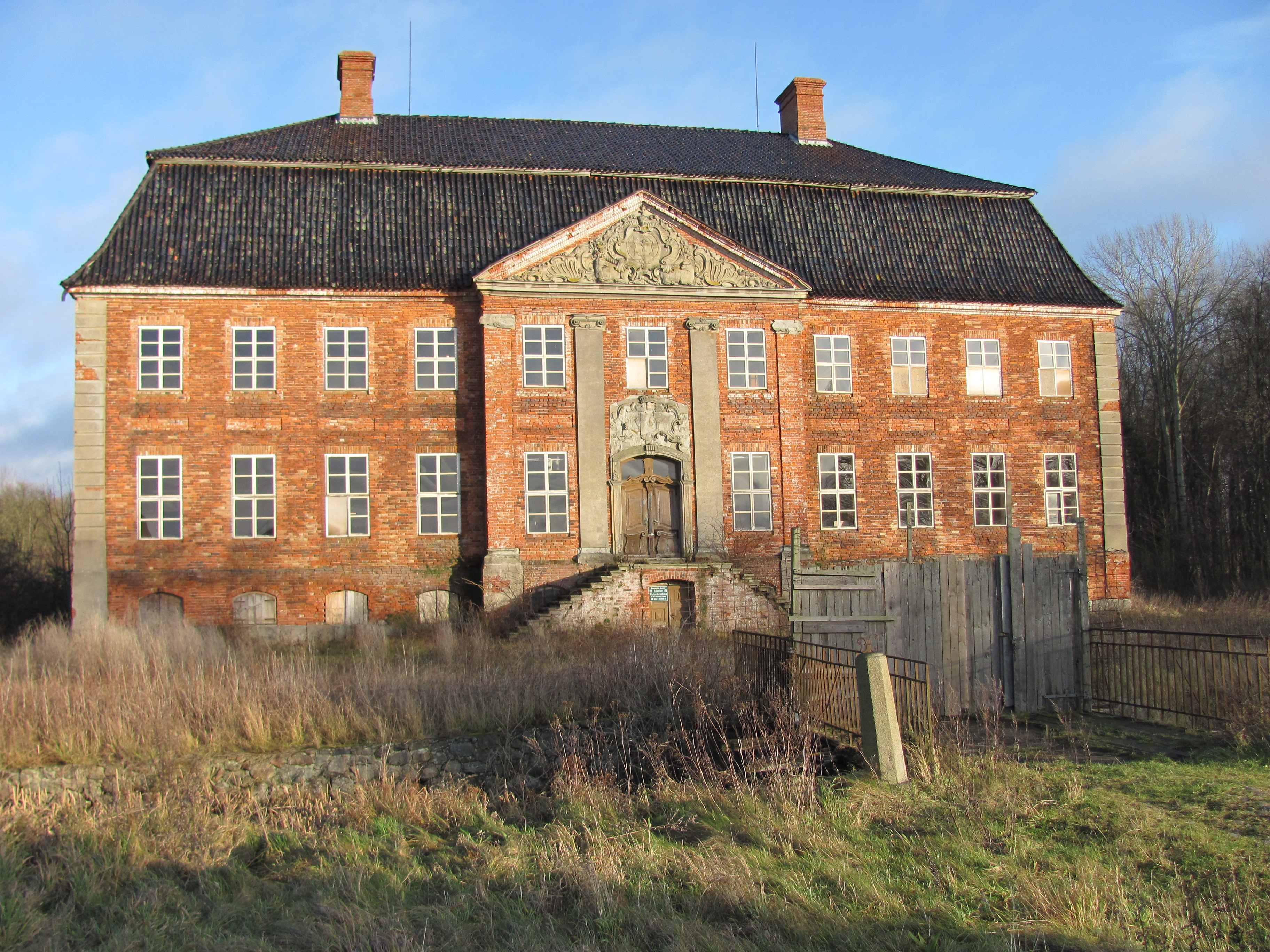 Schloss Johannstorf, Dassow, nähe Travemünde